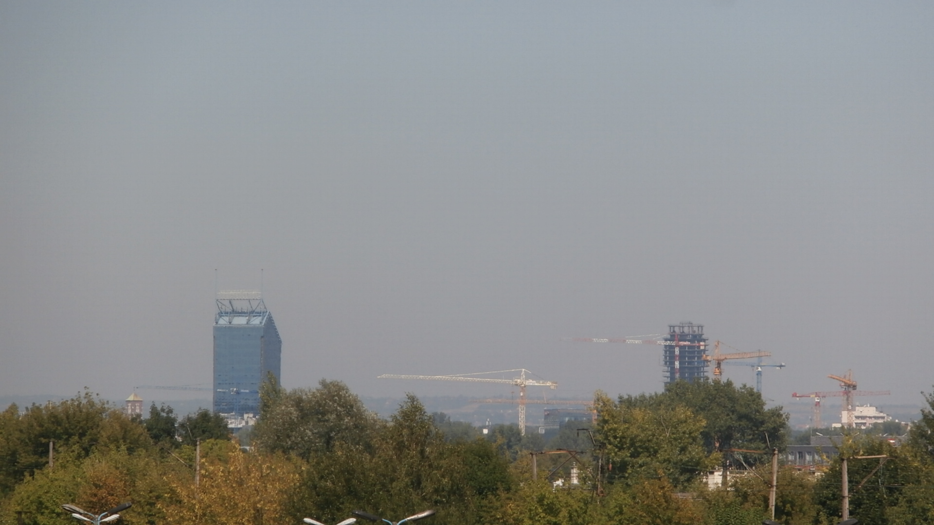 Szkieletor i Błękitek widziane z Płaszowa.